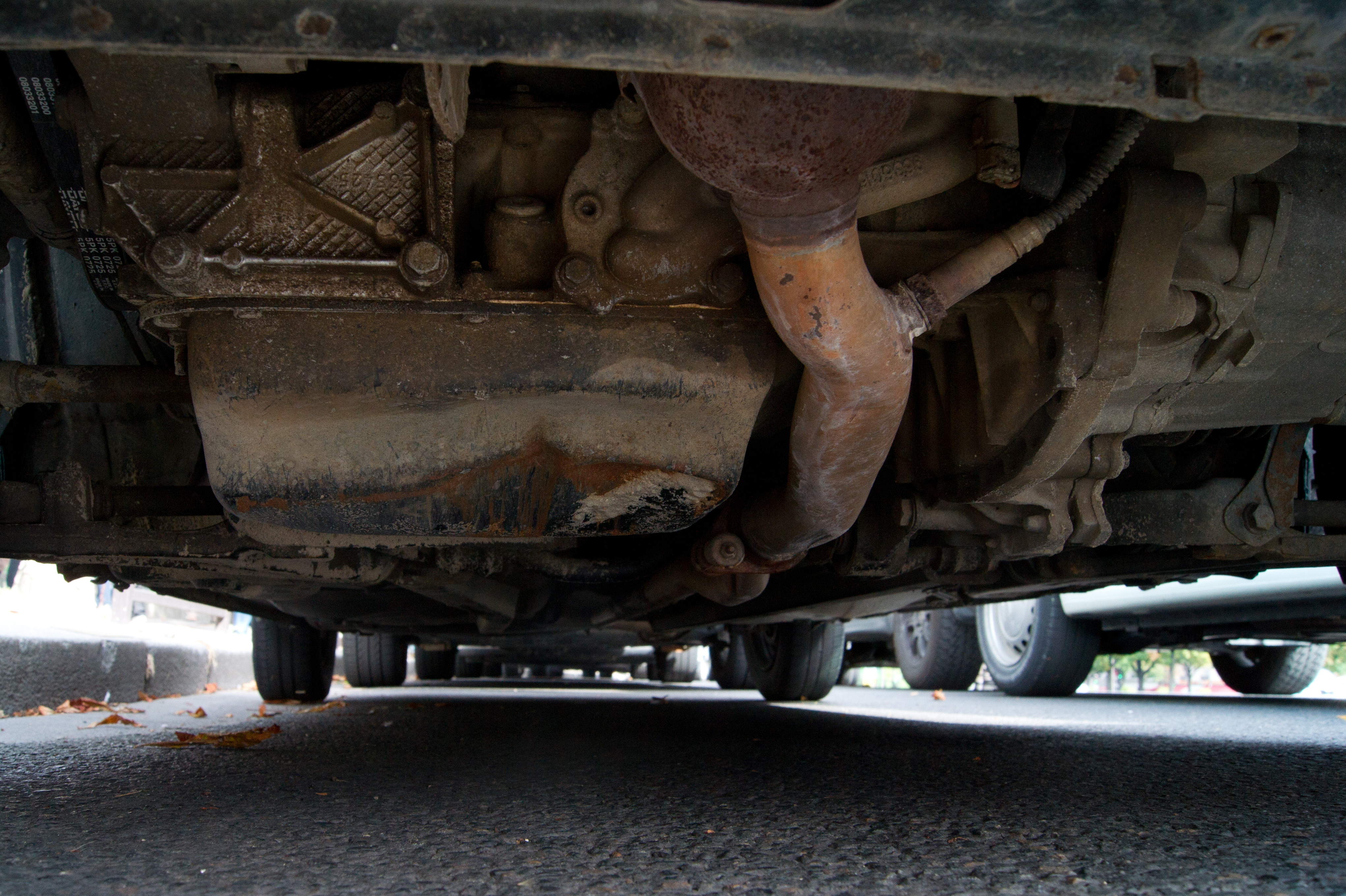 Carter enfoncé après un impact sur une piste finlandaise